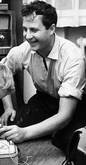 Suomalainen näyttelijä Helge Herala (1922-2010) vuonna 1958. Kuva rajattu alkuperäisestä.